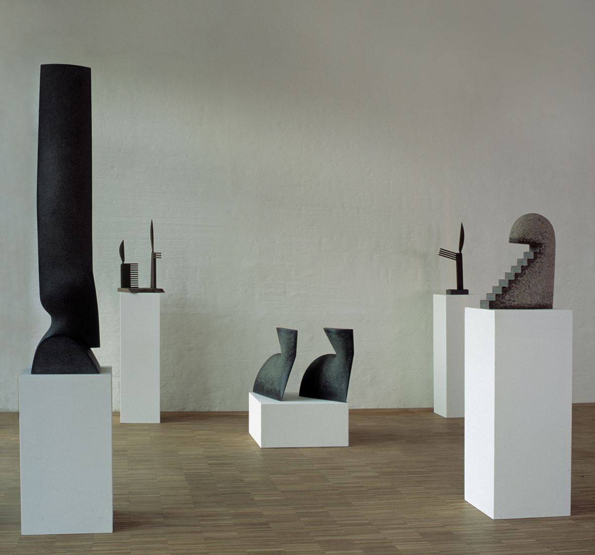 Jürgen Friede - Wächter, 2001, Magmatit, 140x30x30cm